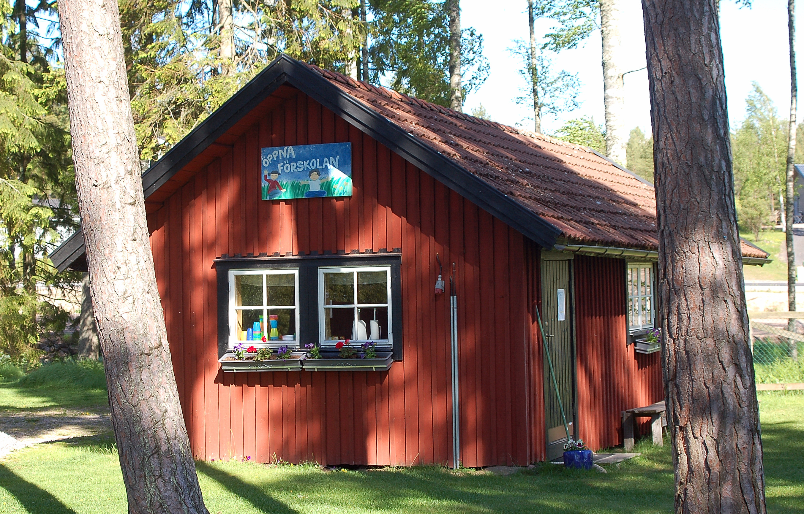 Magasinbyggnad vid Skärgårdskapellet i Kristinehamn, numera används magasinet som öppen förskola.